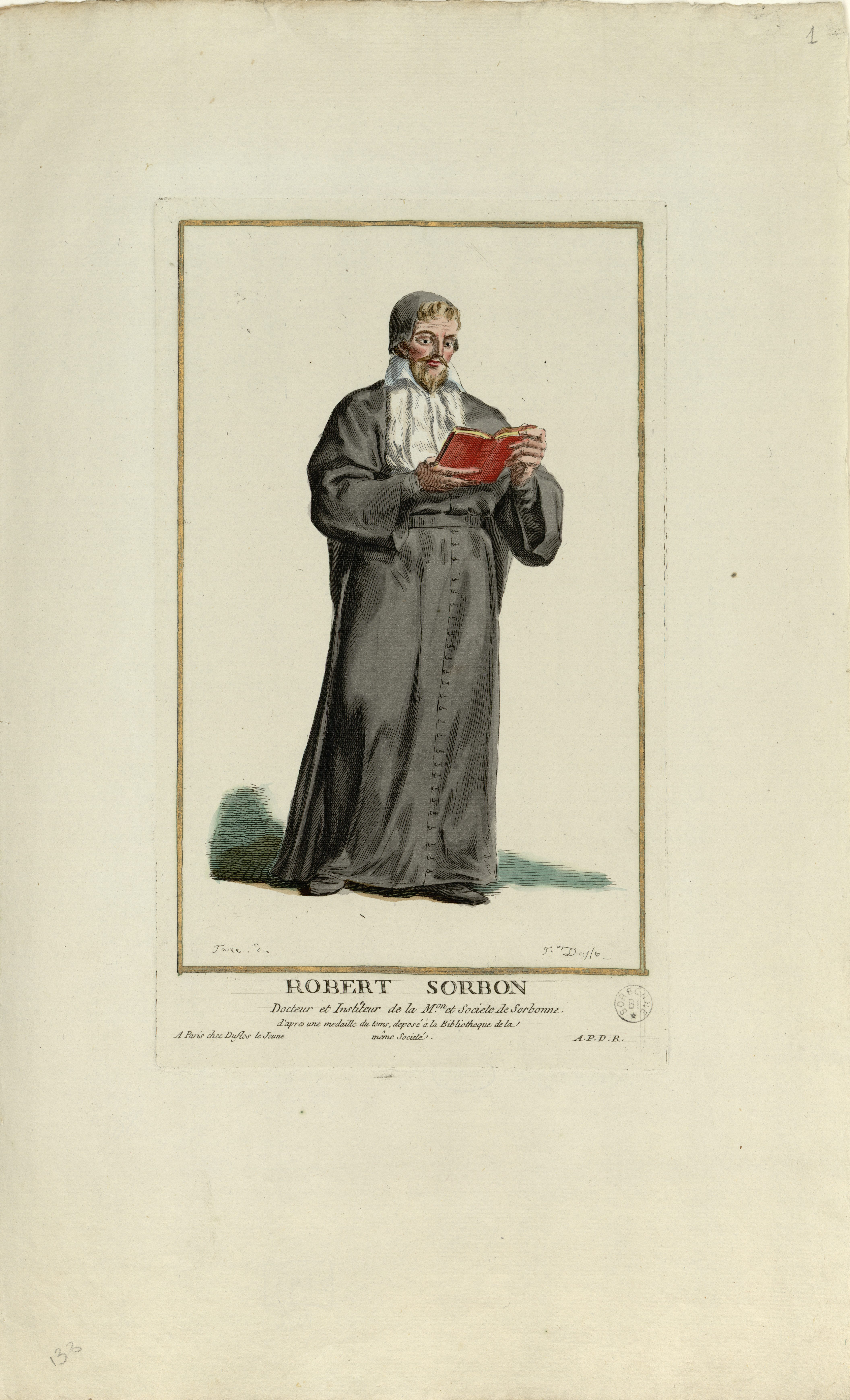 Robert de Sorbon (1201-1274). Estampe